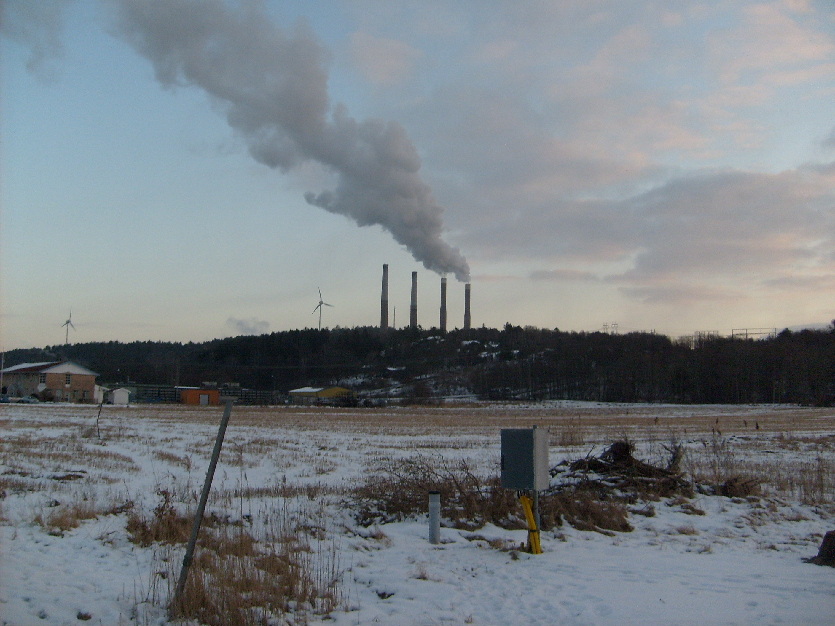 Block 3 & 4 i drift 2012-02-02